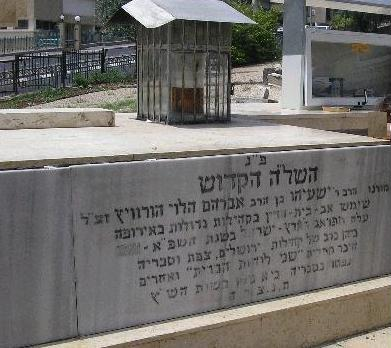 grave of the holy Shelah, Isiah Halevi Horowitz, Tiberias, Israel. קבר השל"ה הקדוש, ישעיה הלוי הורוביץ, טבריה, ישראל